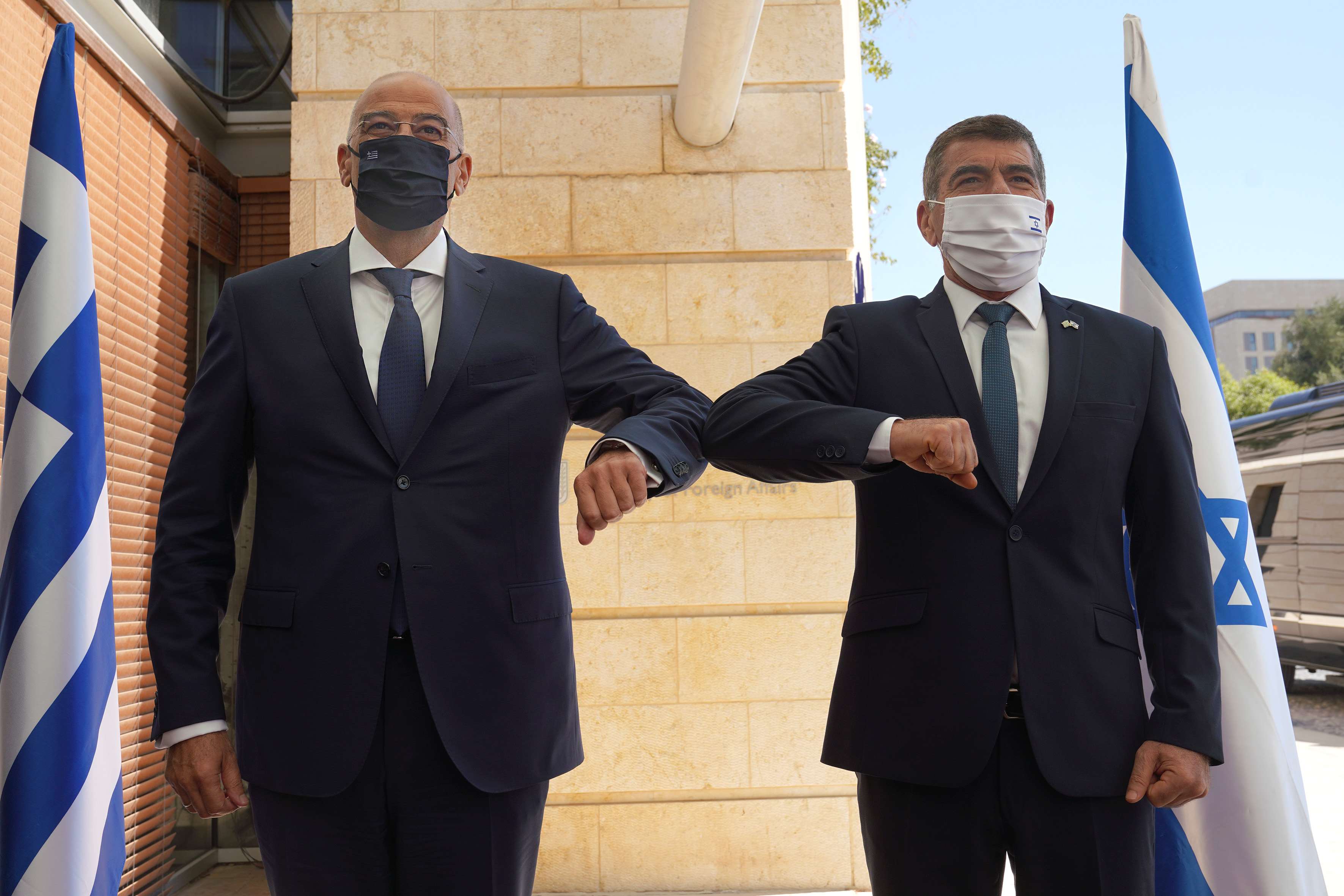 Υποδοχή ΥΠΕΞ Ν. Δένδια από ομόλογο Ισραήλ G. Ashkenazi (Ιερουσαλήμ, 13.08.2020)